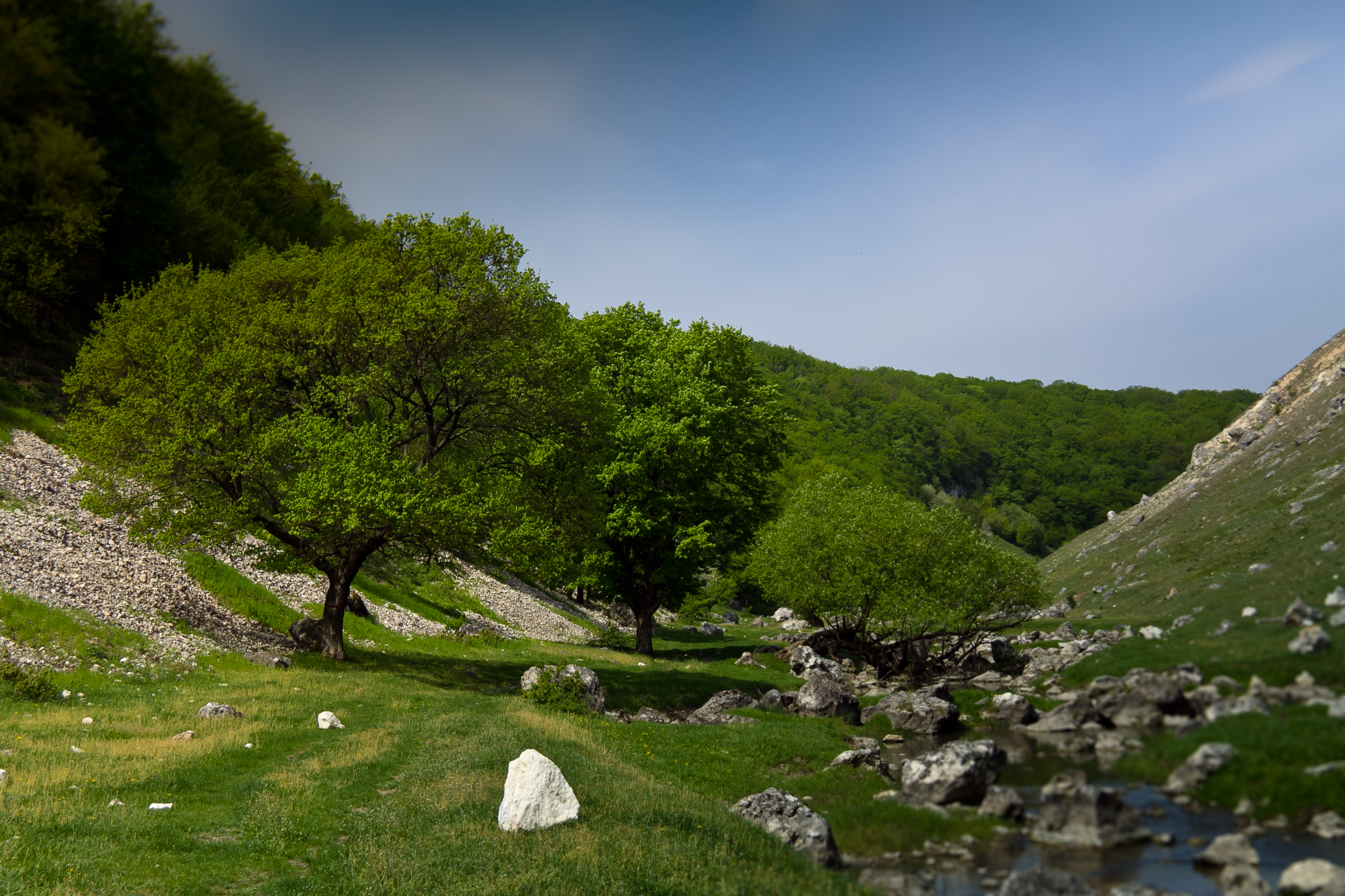 Defileul Burlănești, monument al naturii amplasat în raionul Edineț, la nord-vest de satul Burlănești (cod MD-ED-mn.A-034) A-034